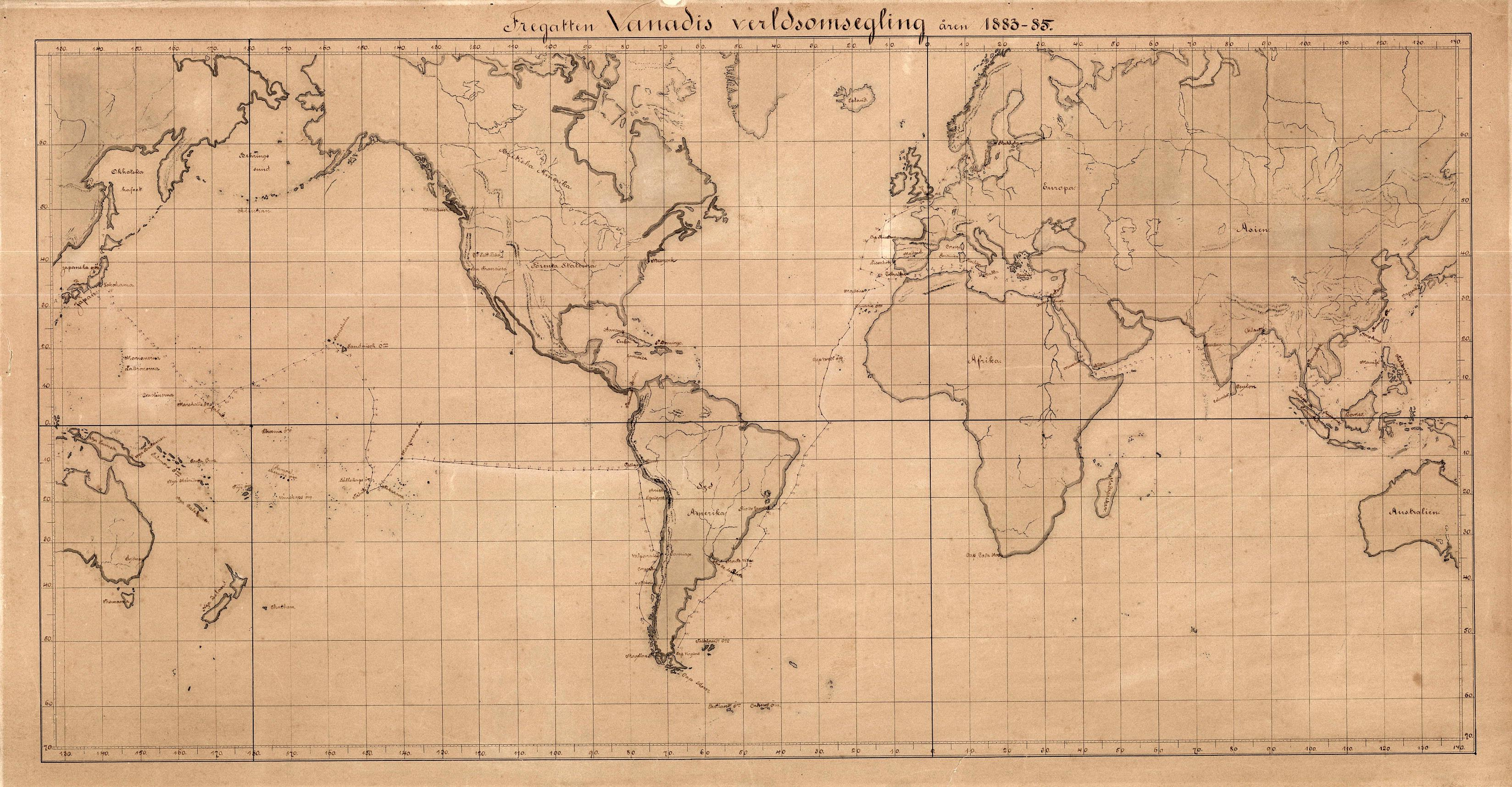 Karta över fregatten Vanadis världsomsegling åren 1883-85. Kartan är från Sjöhistoriska museet.